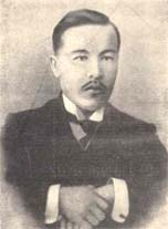 Ivan Stepanovič Palantai Иван Степанович Палантай